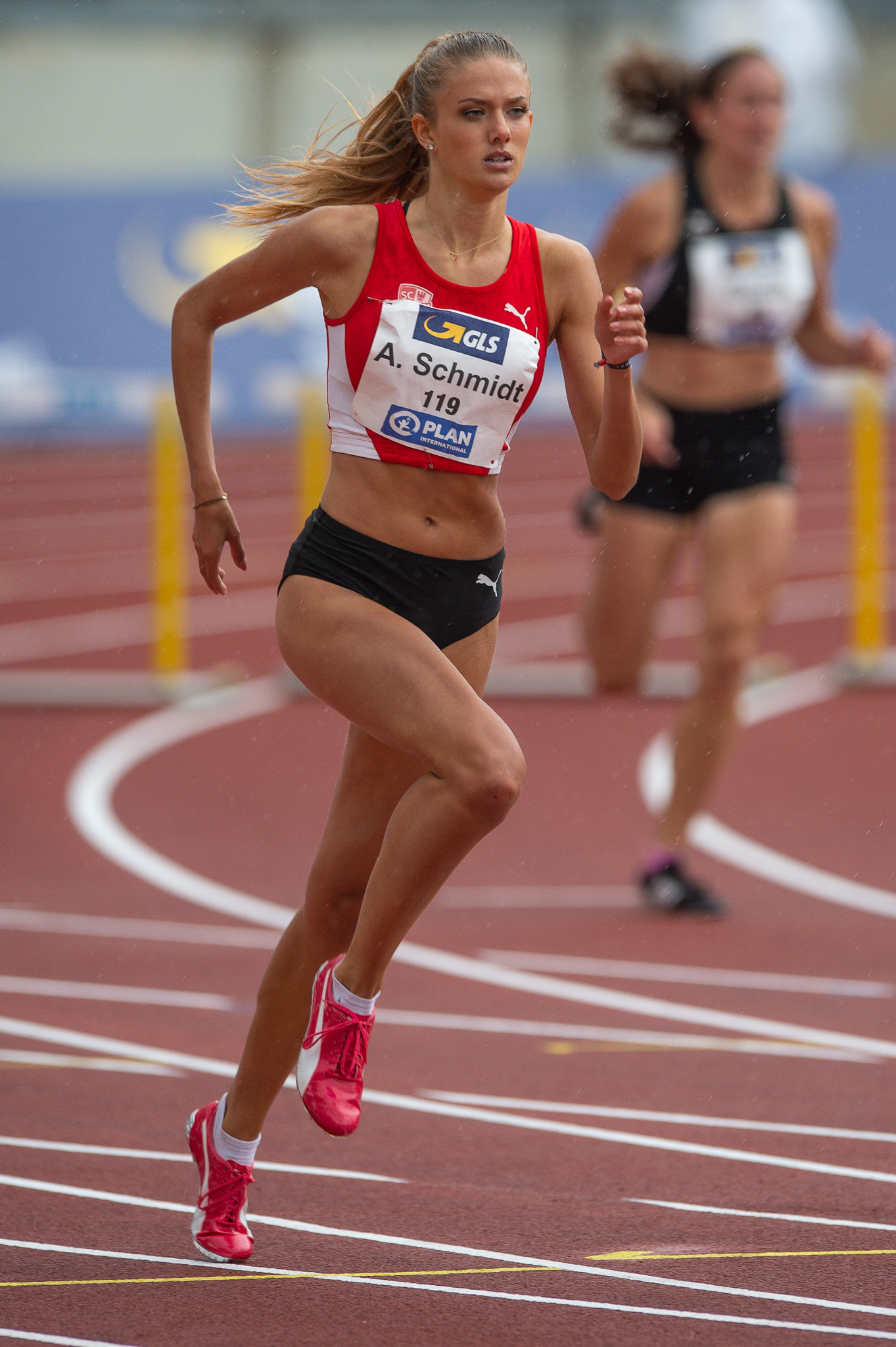 400 metres hurdles,400-Meter-Hürdenlauf,Alica Schmidt,DLV,Deutsche Leichtathletik Meisterschaften 2018,Deutscher Leichtathletik-Verband,Max-Morlock-Stadion,SC Potsdam